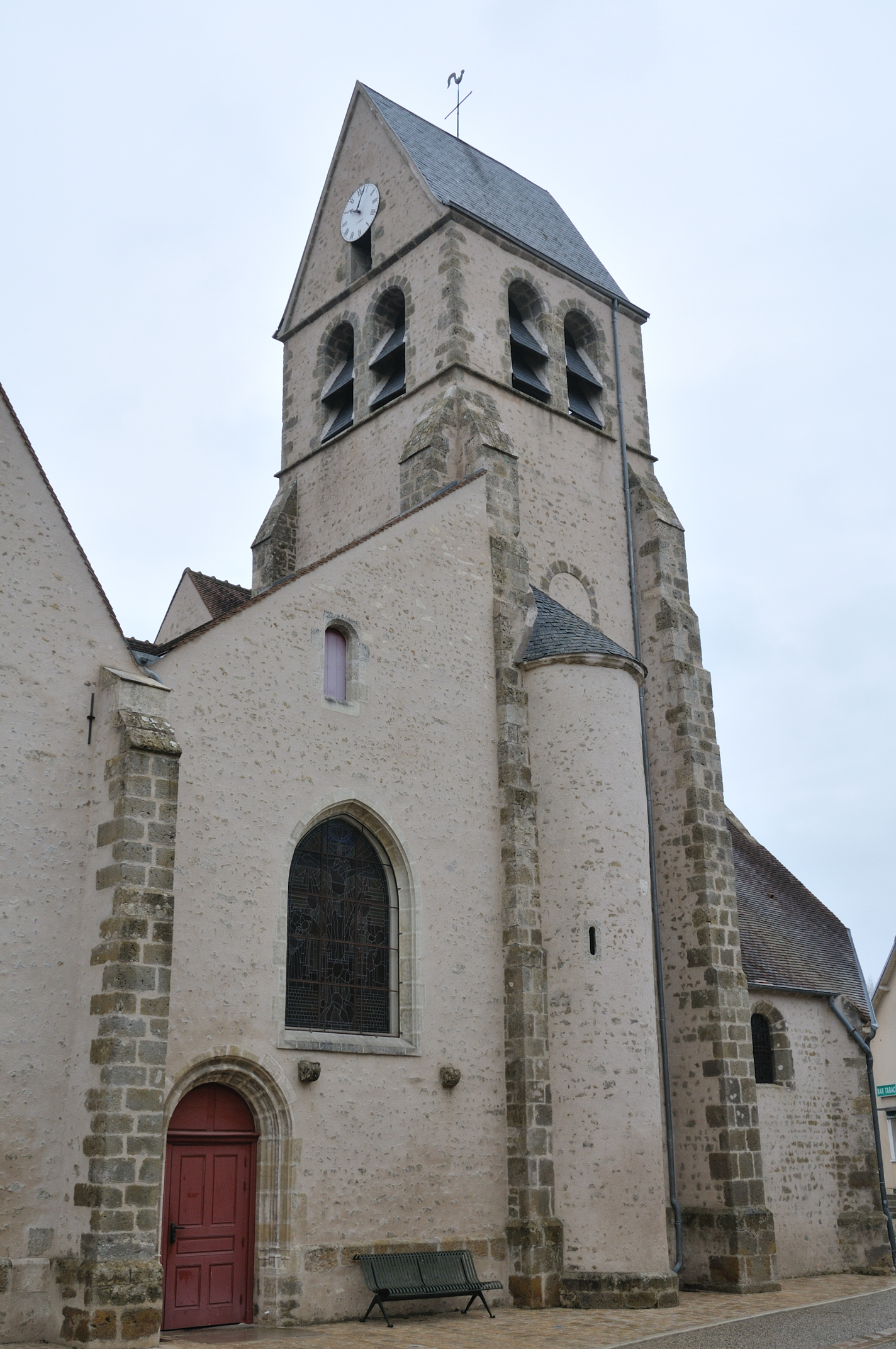 Église Saint-Étienne, Donnery, Loiret, France